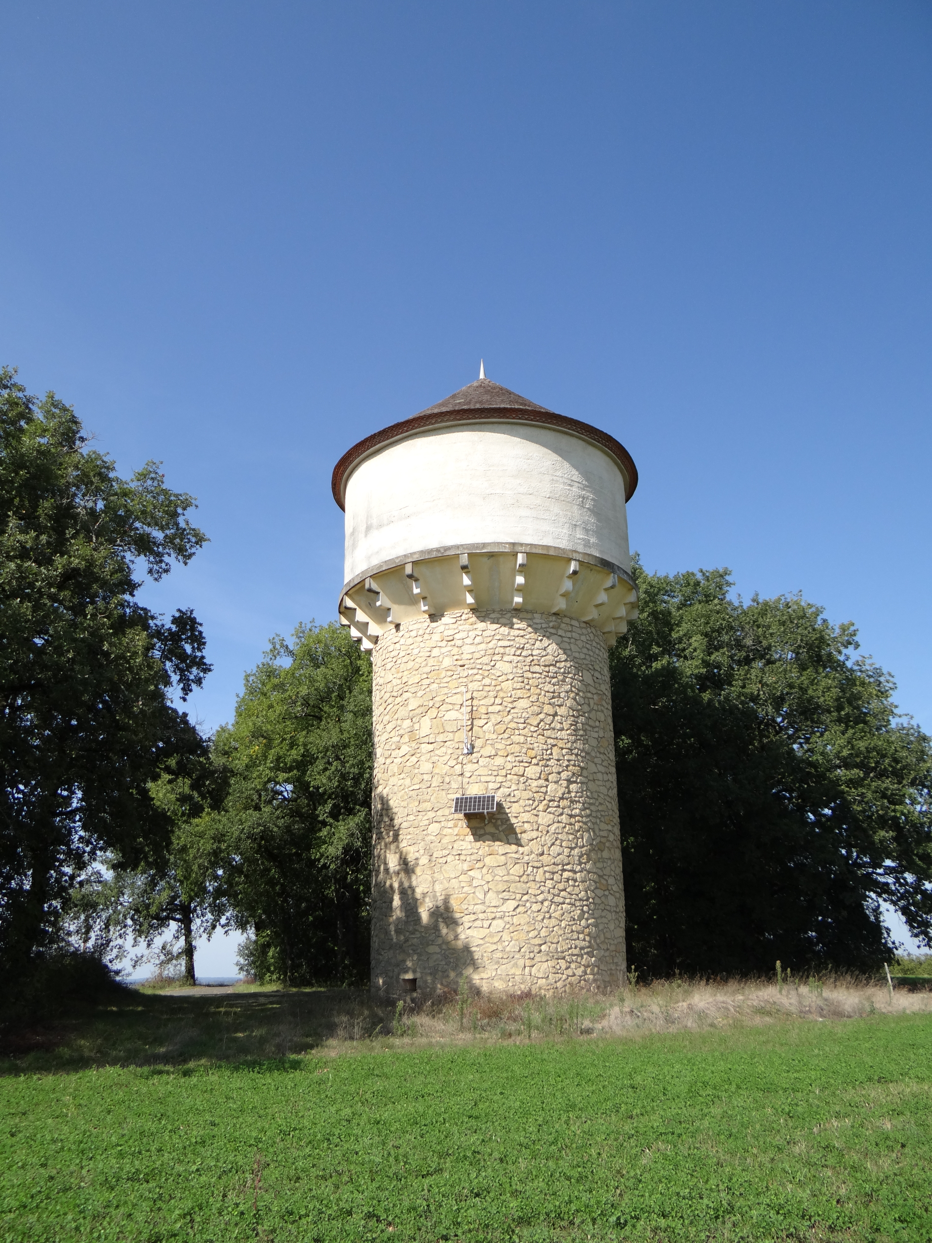 Mayrac (Lot, France) le château d'eau